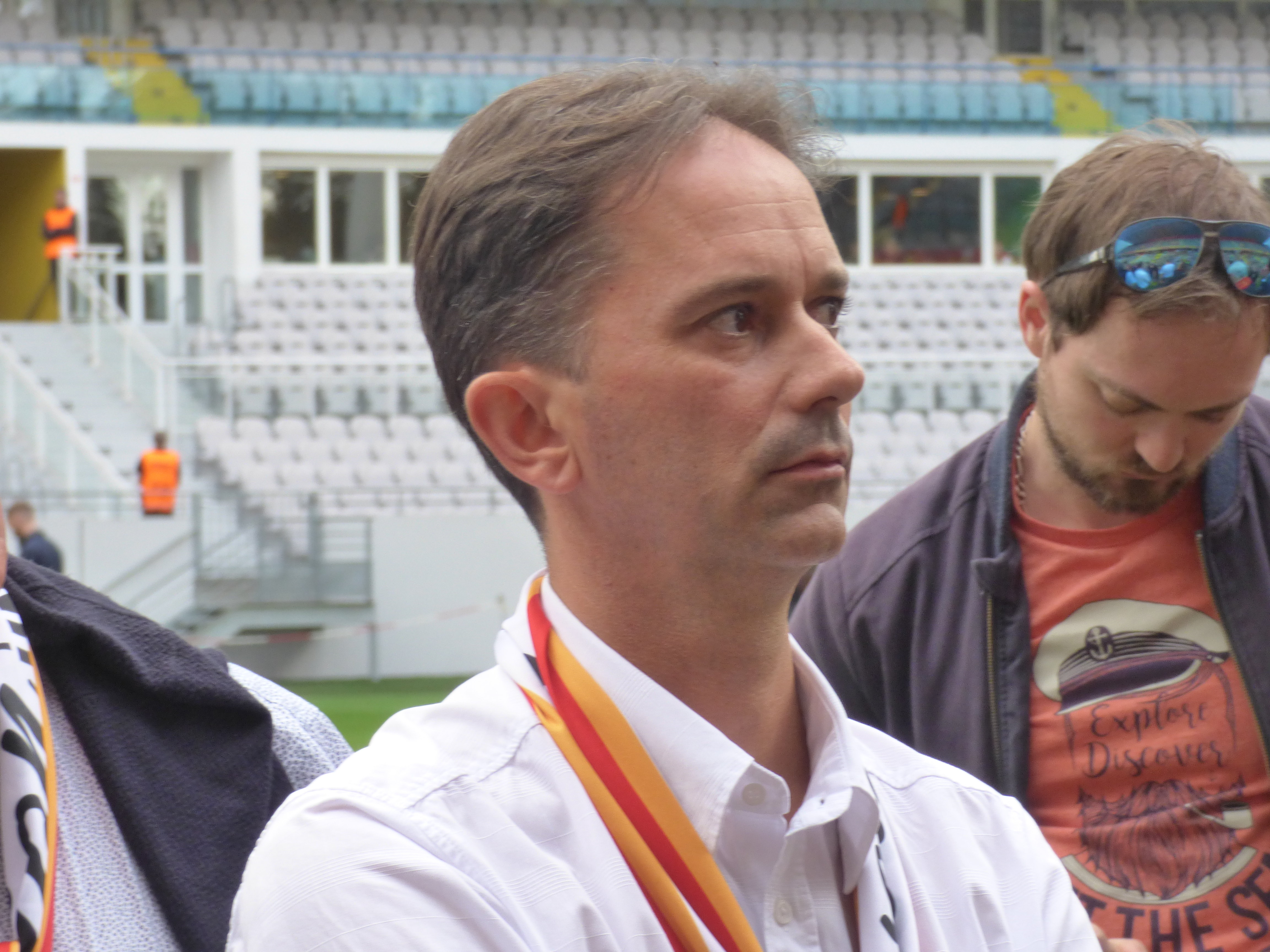 Sylvain Robert avant le match Lens / Sochaux, comptant pour la septième journée du championnat de France de football de Ligue 2, le 15 septembre 2018.